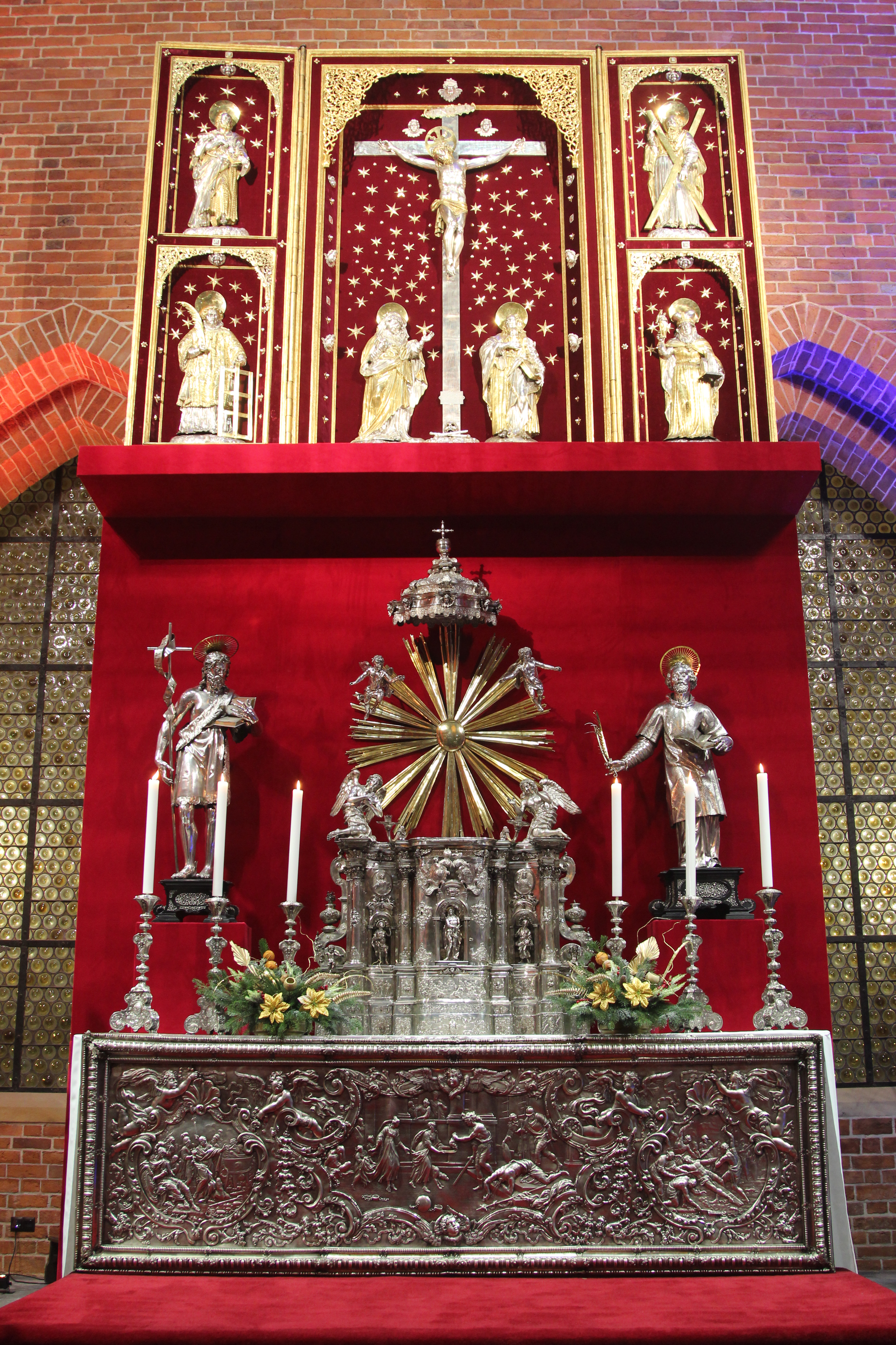 Archikatedra św. Jana Chrzciciela we Wrocławiu ołtarz główny fundacji biskupa Andreasa Jerina